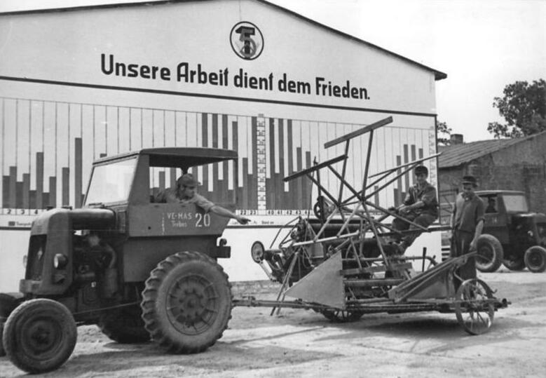 Trebus, Maschinengespann vor Leistungstafel Illus Klein 28.6.51 Erntevorbereitungen auf der MAS Trebus Krs. Seelow. Um eine Steigerung der Produktion in der Landwirtschaft zu erreichen und die Lebenslage der Werktätigen noch weiter zu verbessern, muss die Ernte ohne Verlust eingebracht werden. Das ist nur möglich, wenn die landwirtschaflichen Maschinen in Ordnung sind. Daher werden auf allen MAS umfangreiche Erntevorbereitungen getroffen. Unsere Fotos zeigen die Vorbereitungen auf MAS Trebus. UBz: FdJ-ler von der FdJ-Betriebsgruppe der MAS Trebus haben aus Schrotteilen einen Mähbinder in freiwilliger Arbeit als Verpflichtung für die Weltfestspiele und als Beitrag zur beschleunigten Einbringung der Ernte hergestellt. Leihweise Illus Berlin W 8